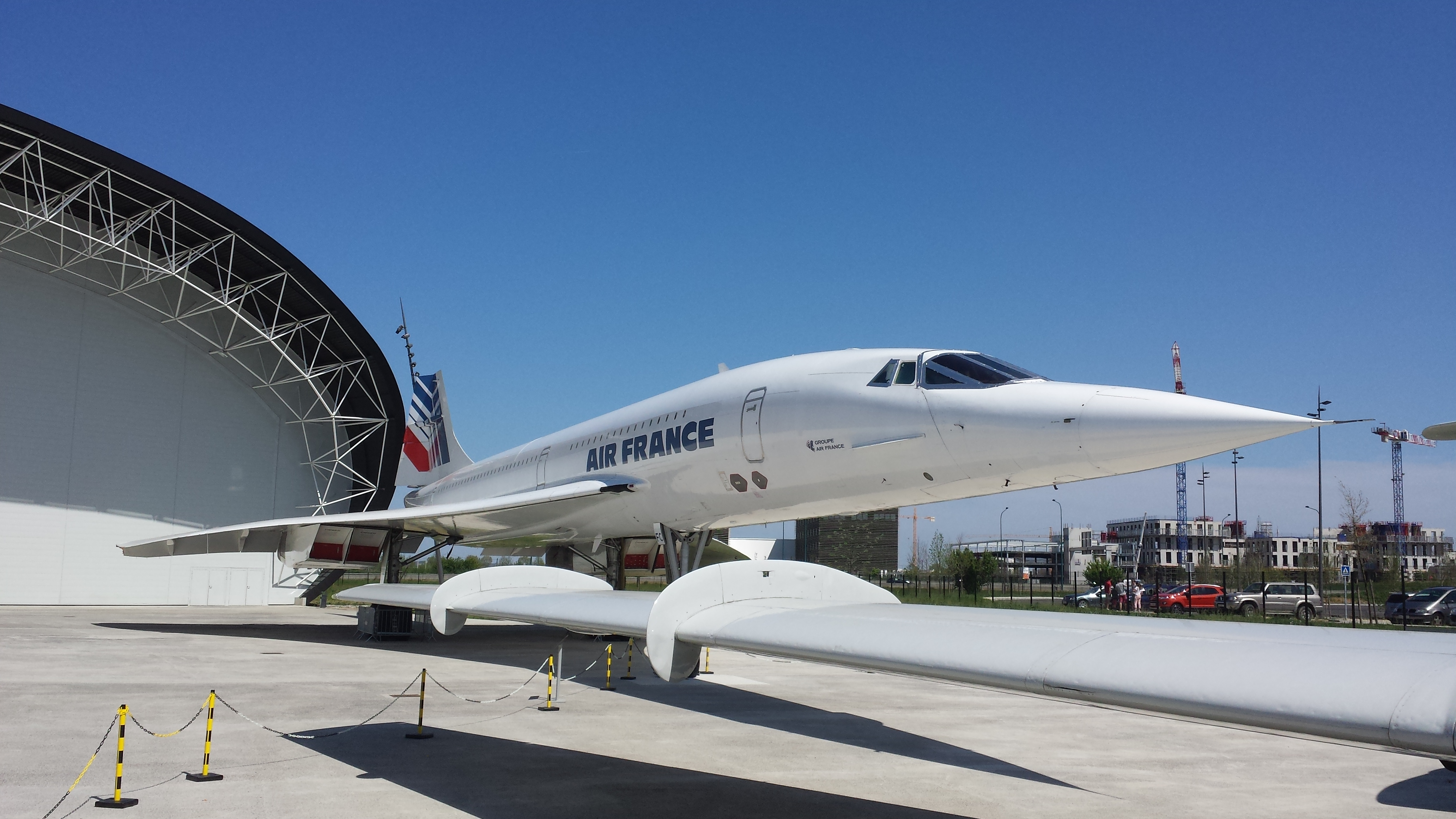 Eine Concorde der Air France steht vor dem Musée aeroscopia in Toulouse. Im Vordergrund sieht man einen Teil eines benachbarten Flugzeugs, links den Hangar in dem ein Teil des Museums untergebracht ist.